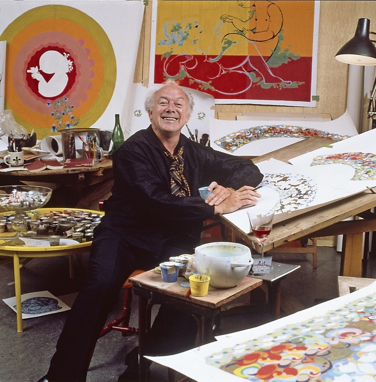 Bjørn Wiinblad